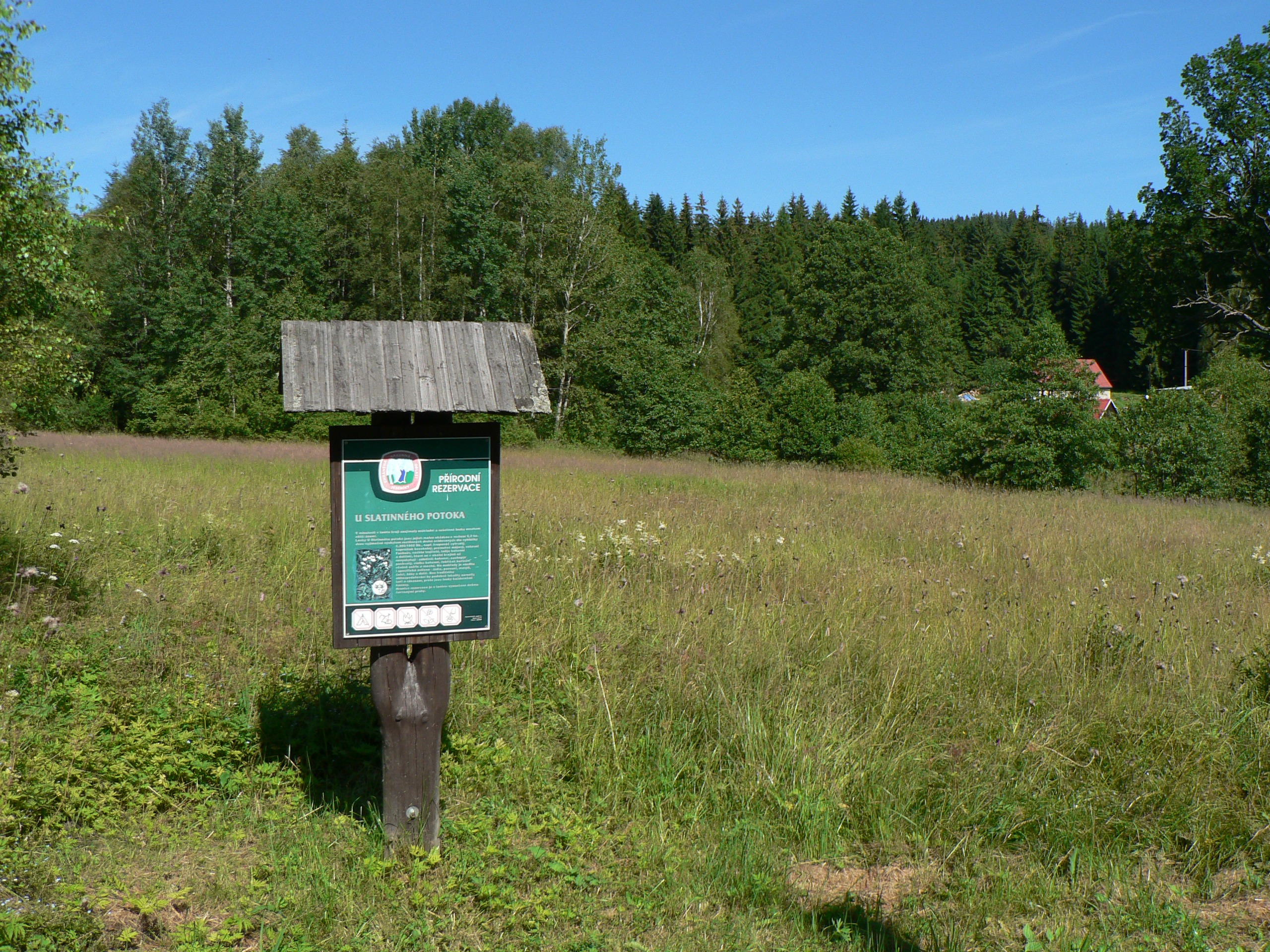 Přírodní rezervace U Slatinného potoka na okraji obce Žďárský potok